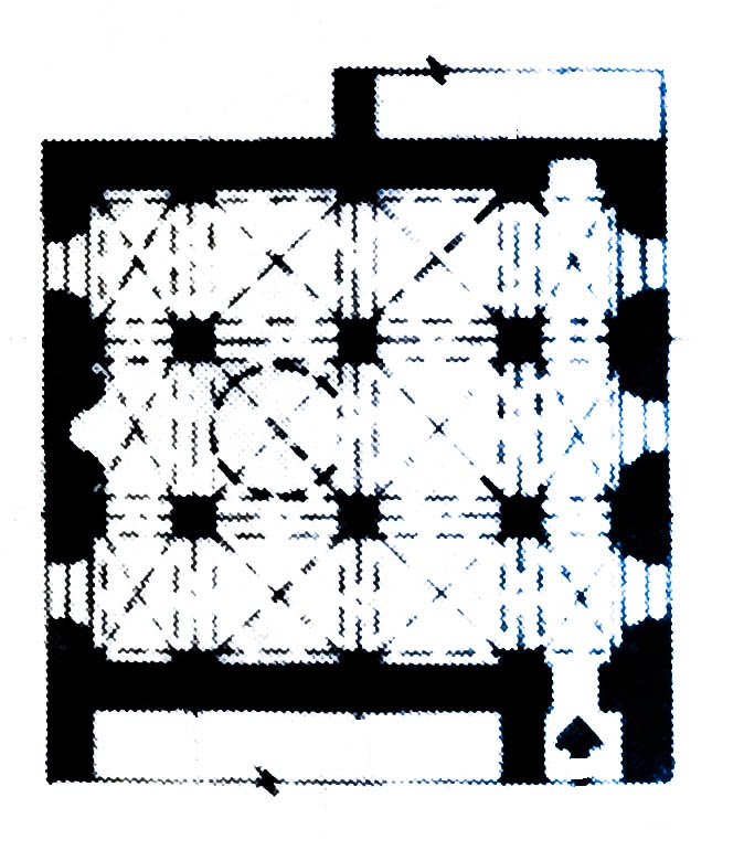 Mirsiyab oğlu karvansarayının planı